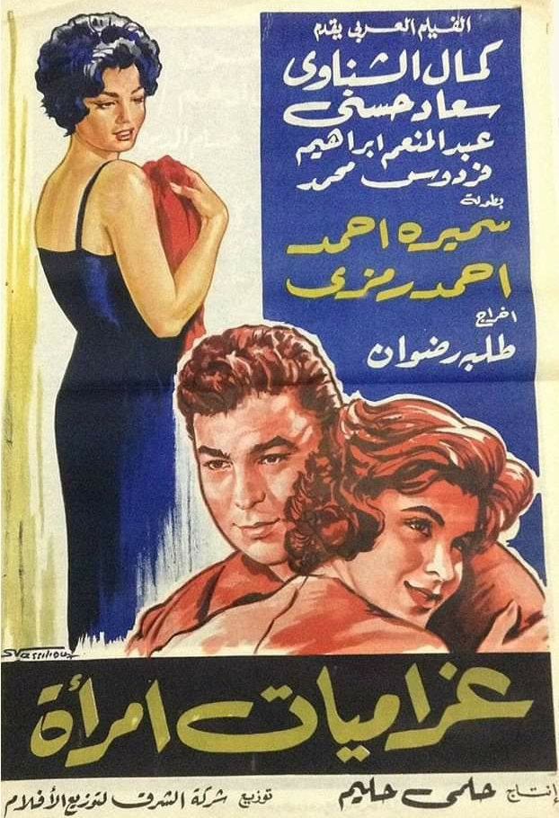 بوستر فيلم غراميات إمرأة 1960